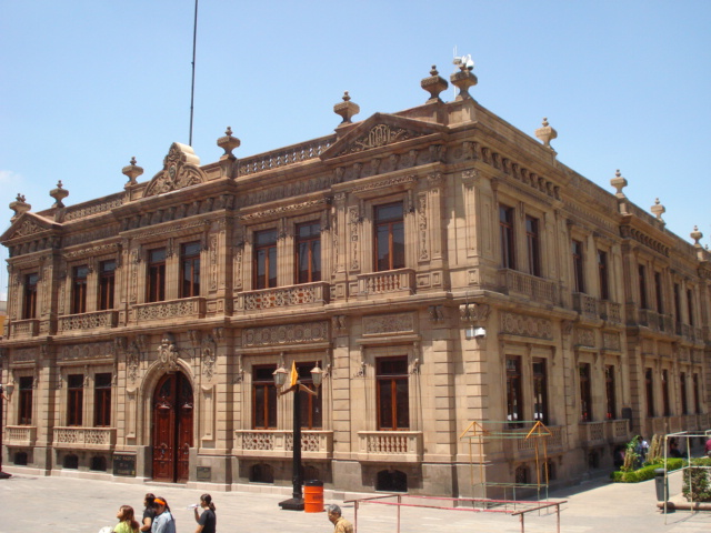 Edificio de Telegrafos, actual museo de la mascara en la ciudad de San Luis Potosí, México.